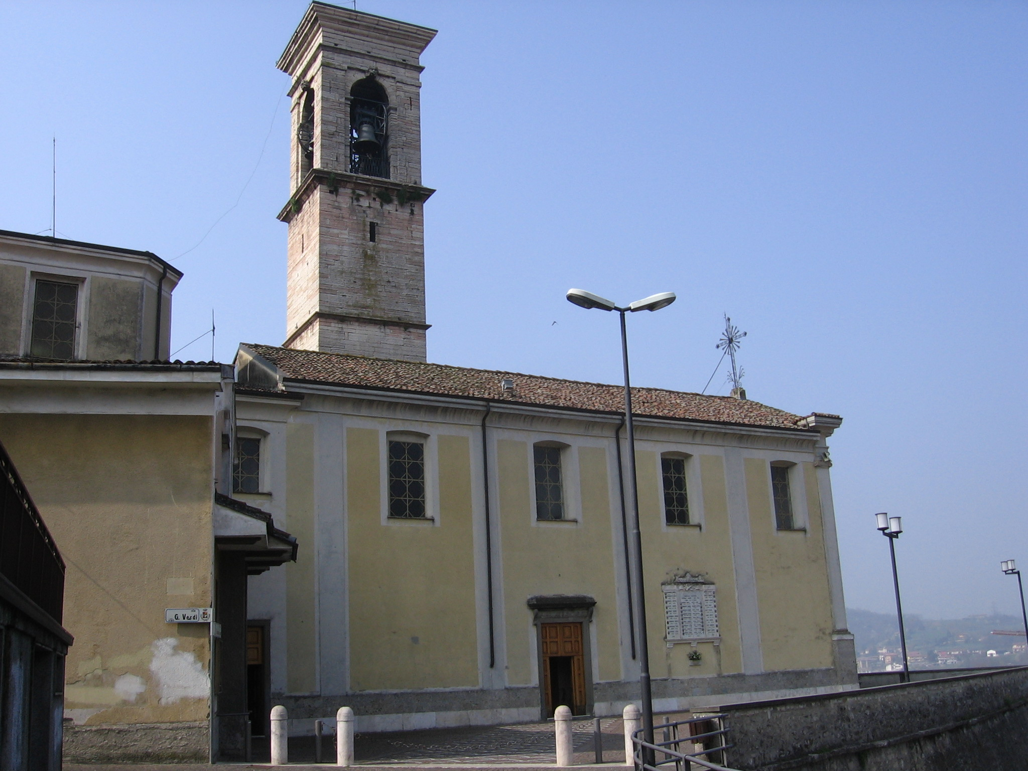 Entratico, Bergamo, Italia